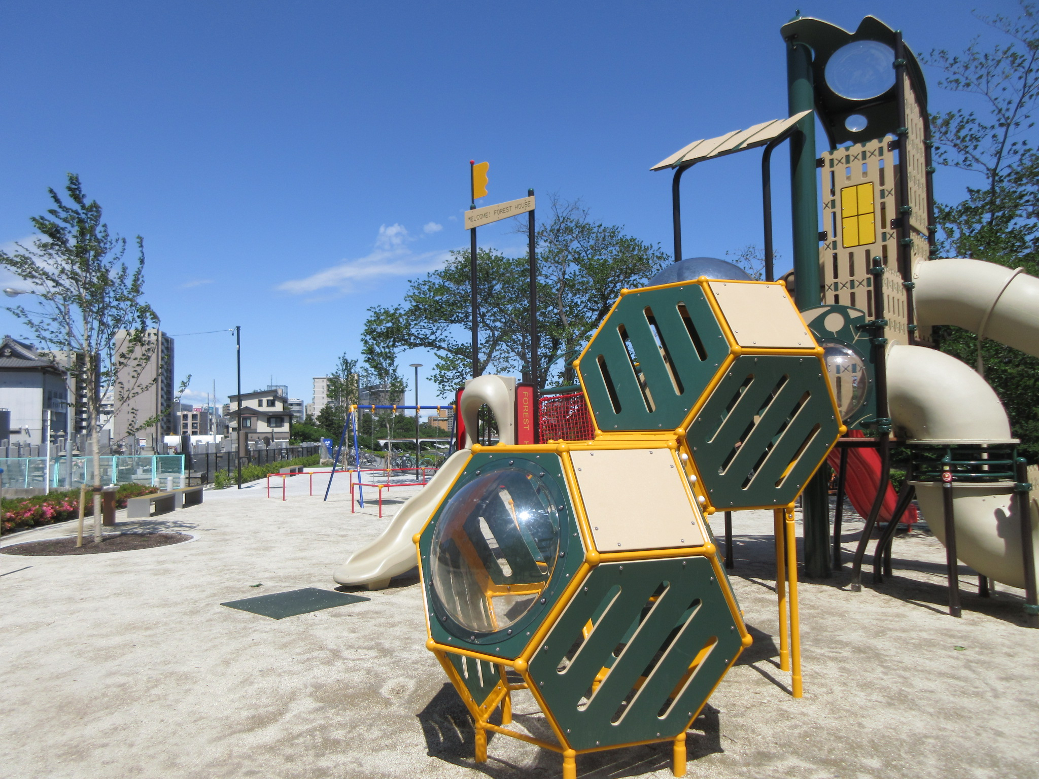 吹矢橋公園（岡崎市吹矢町）